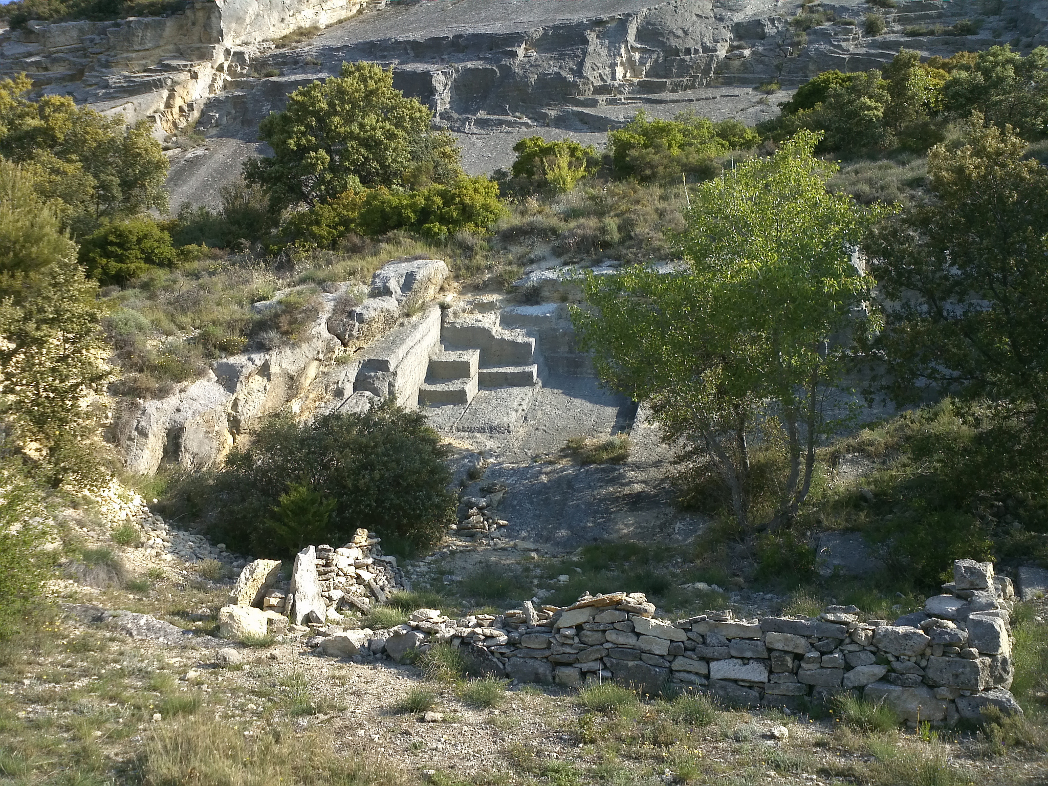 Carrière de pierres d'Aubune